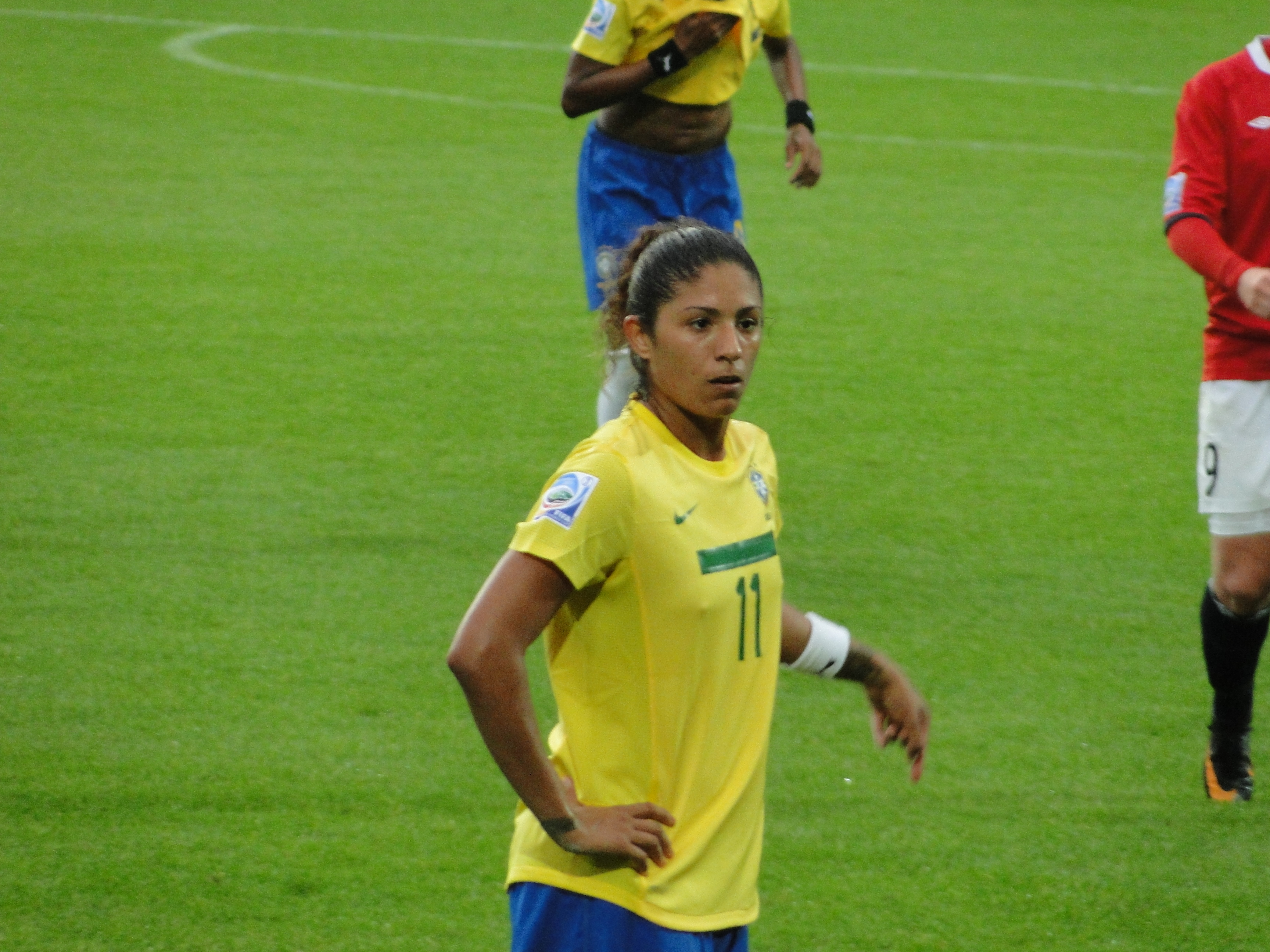 Cristiane Rozeira de Souza Silva - Match de phase de groupes de la coupe du monde entre le Brésil et la Norvège le 3 juillet 2011 à Wolfsbourg